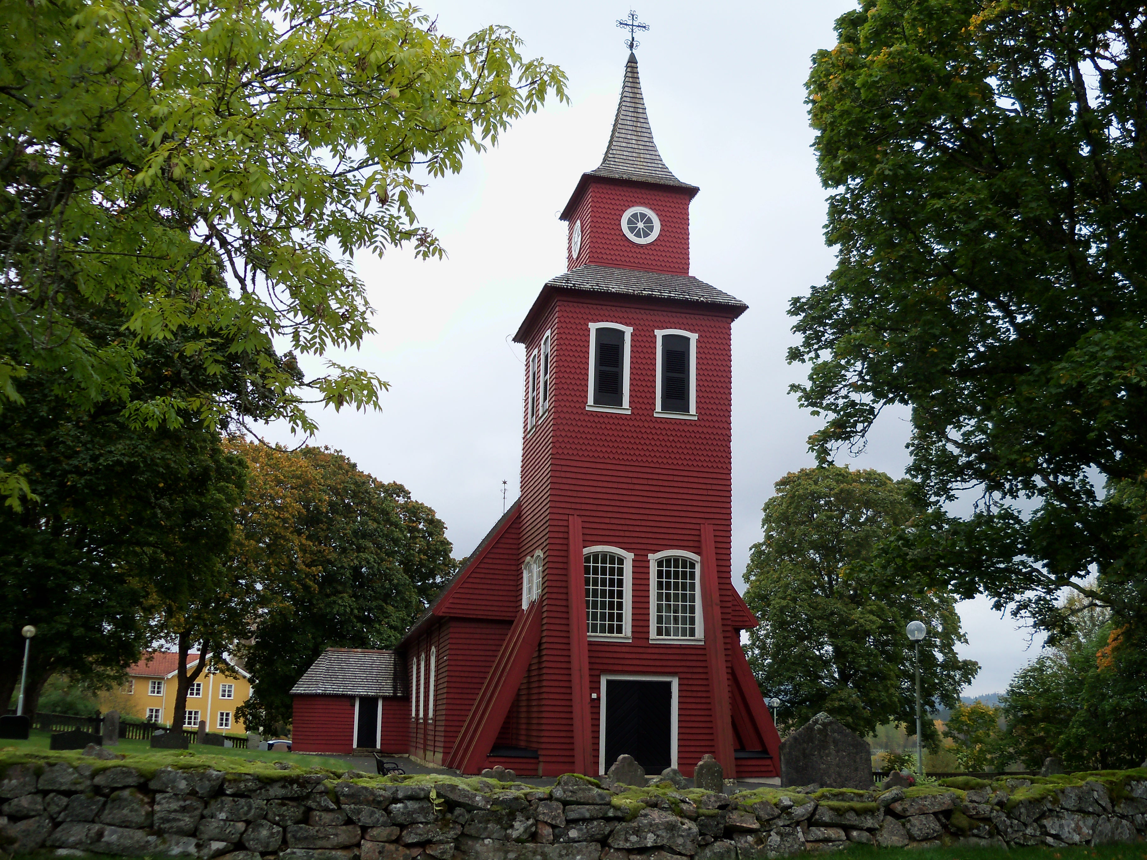 Mulseryds kyrka